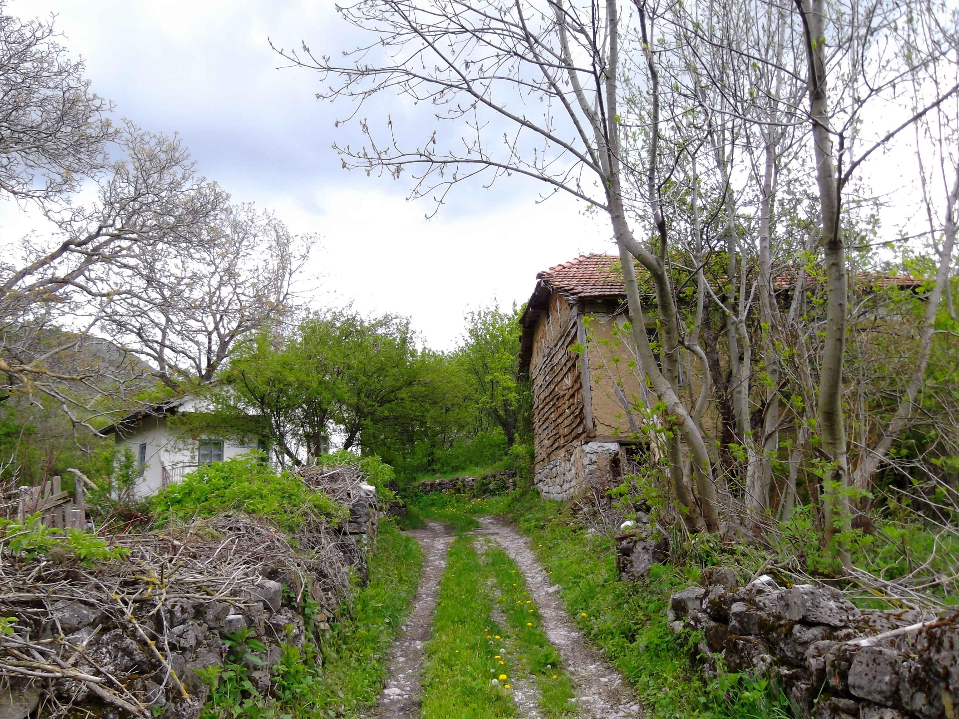 Бившето село Меча поляна, понастоящем махала на с. Добърчин.